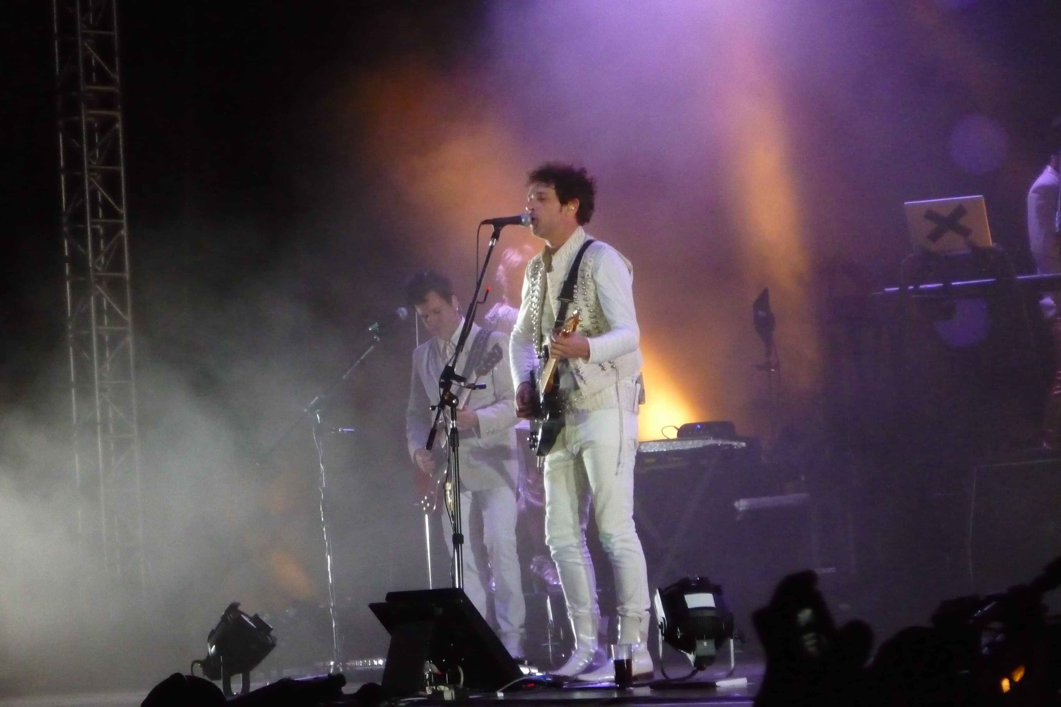 Gustavo Cerati